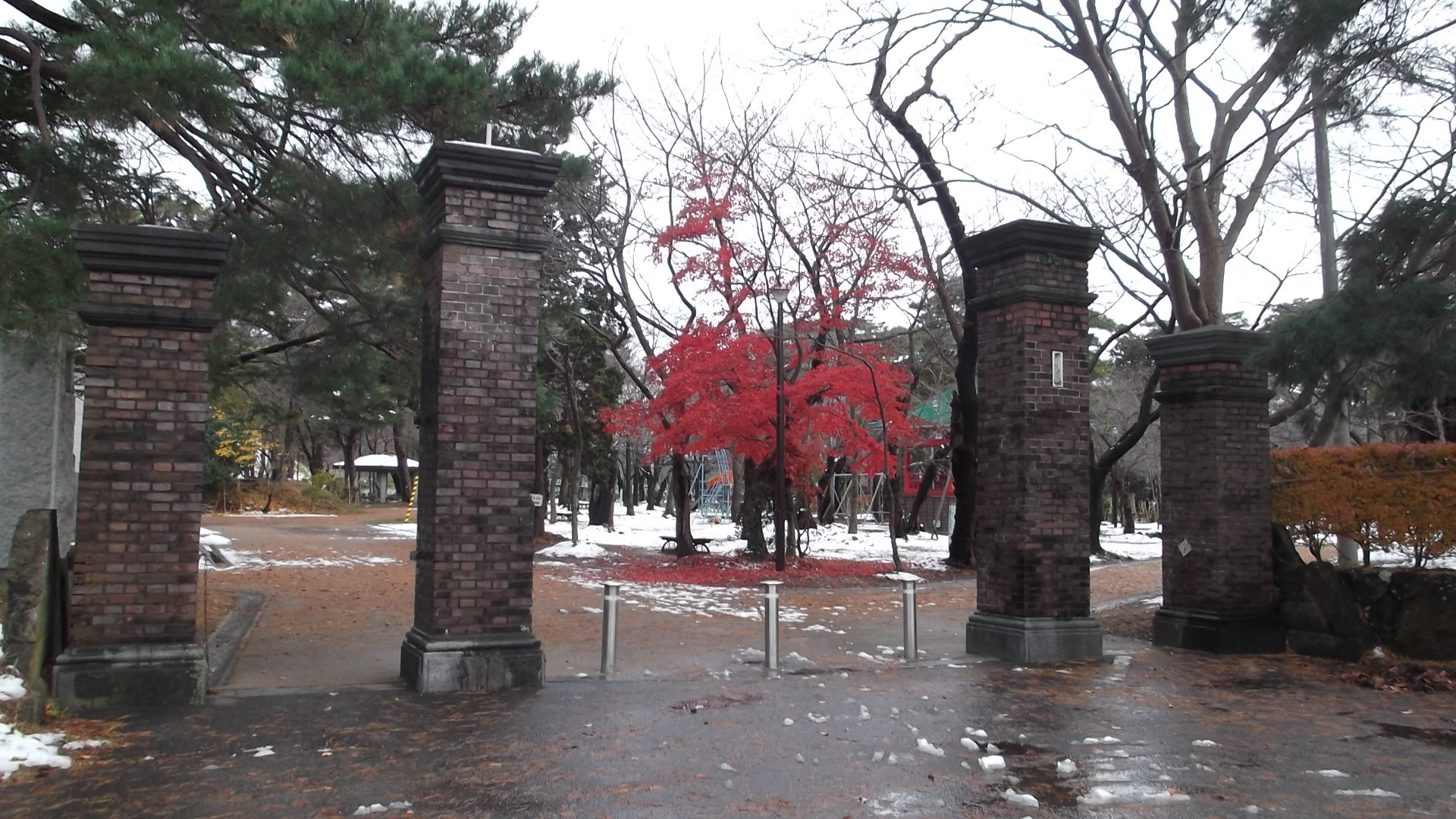 旧陸軍第13師団司令部営門跡 （新潟県上越市高田公園内）